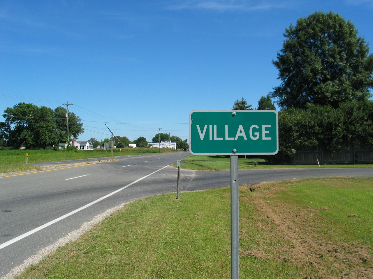 Sign for Village, Virginia